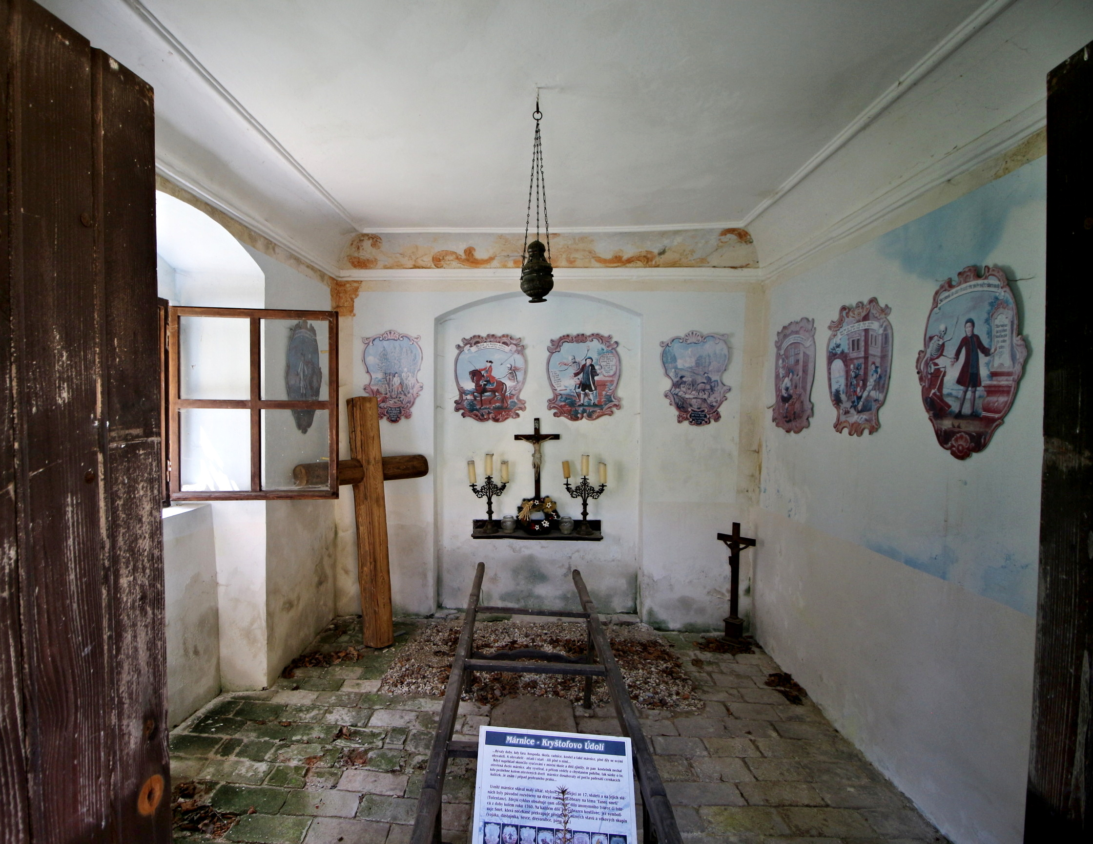 Kryštofovo údolí, hřbitovní kostel sv. Kryštofa s márničkou a farou